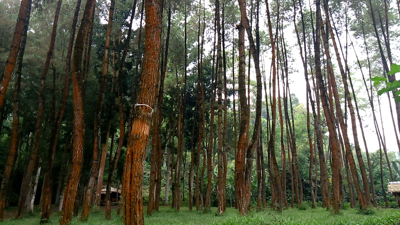 Hutan pinus di desa Poncokusumo ini dikelola oleh Perhutani sebagai wahana masyarakat untuk ber rekreasi dan beraktivitas yang berorientasi kepada alam. Udaranya sangat sejuk dan bersih. Sangat tepat untuk berolahraga dan berlatih meningkatkan stamina. Hutan pinus yang dinamai Bedengan ini diharapkan tidak menjadi area wisata yang mencemari dan mengganggu keseimbangam alami.